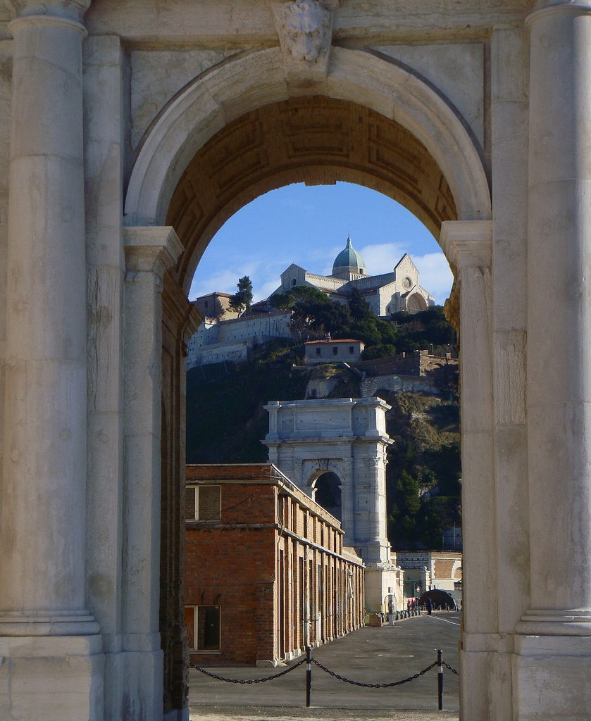 Veduta del Duomo e dell'Arco di traiano attraverso l'Arco Clementino